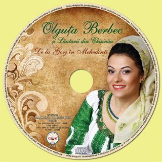 Imagine album muzical